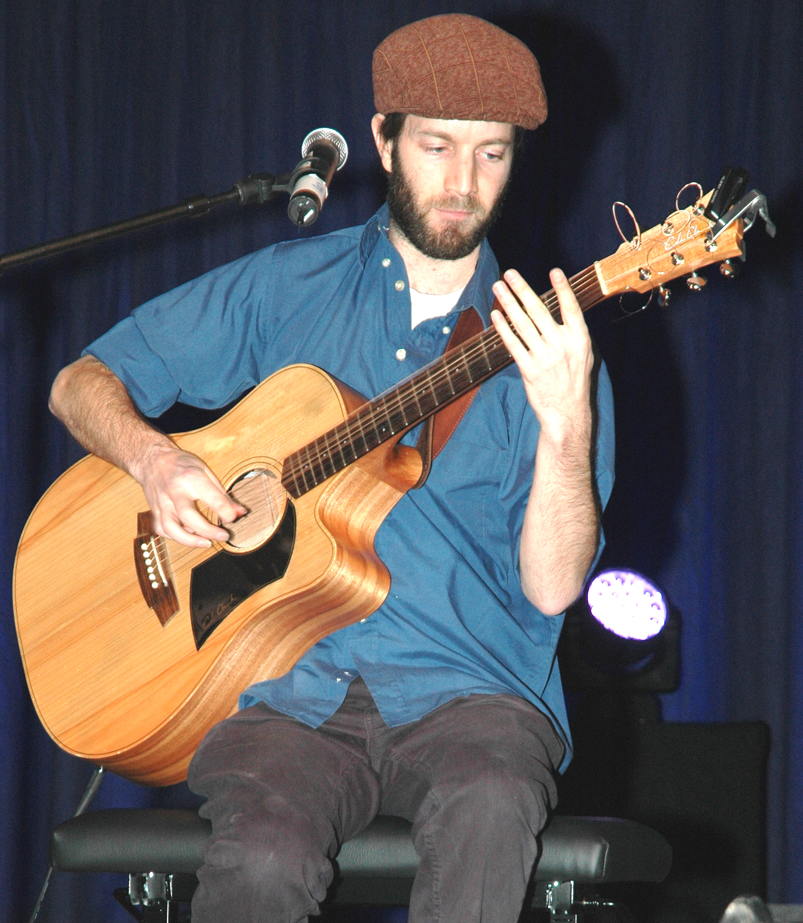 Tim McMillan auf der Freiburger Kulturbörse 2012